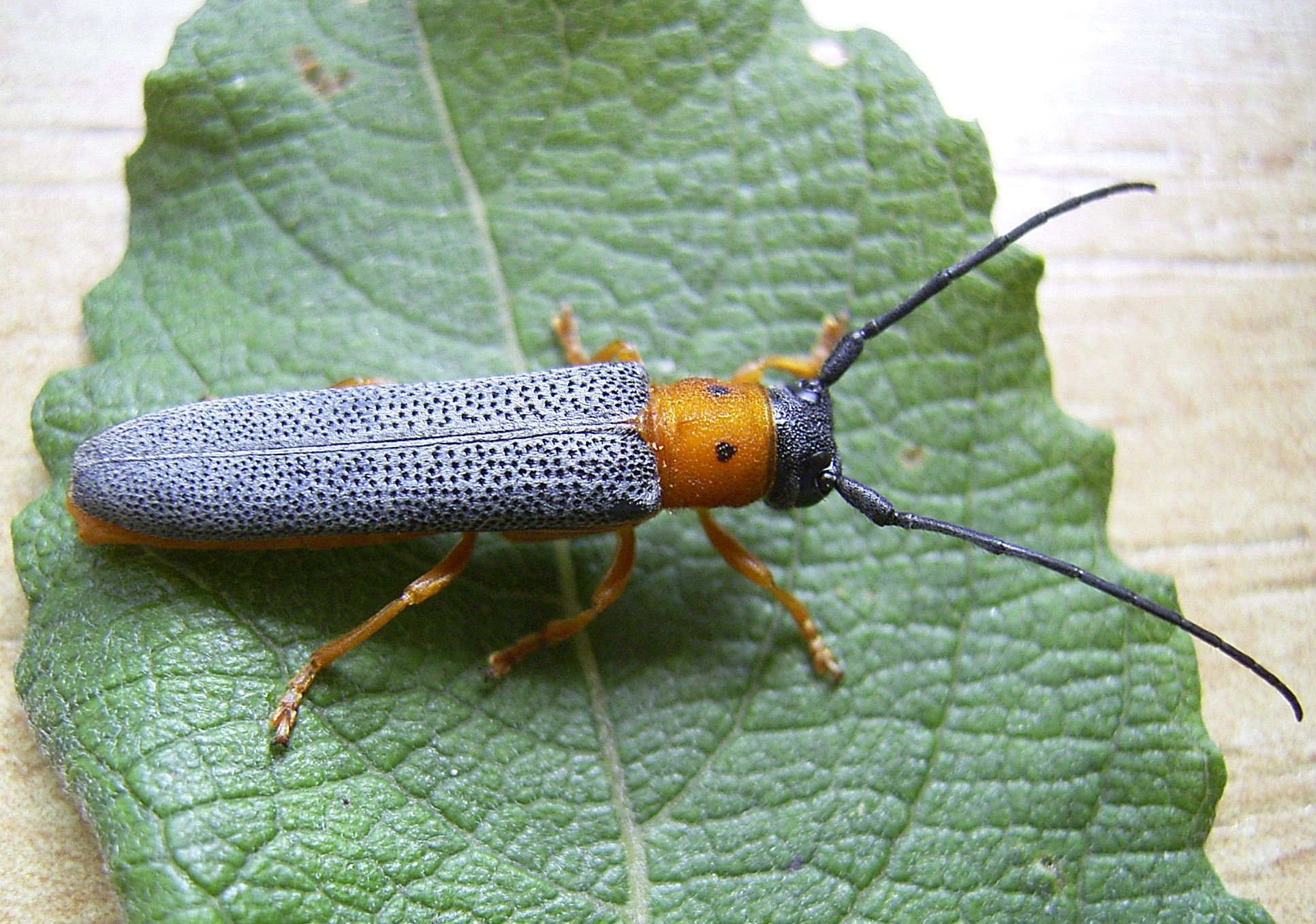 Oberea oculata auf Blatt von Salix